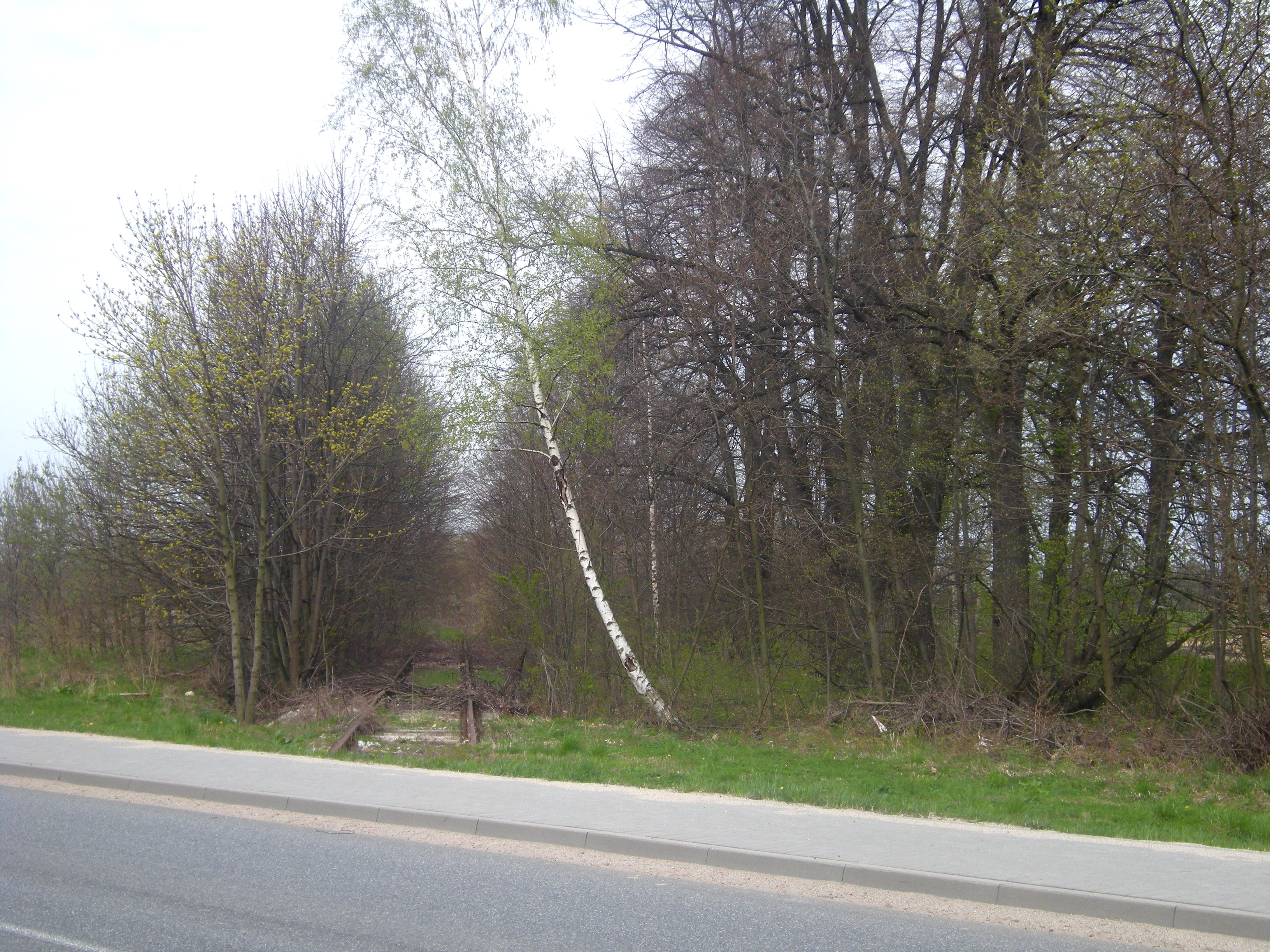 Miejsce po przystanku kolejowym w Podkamieniu